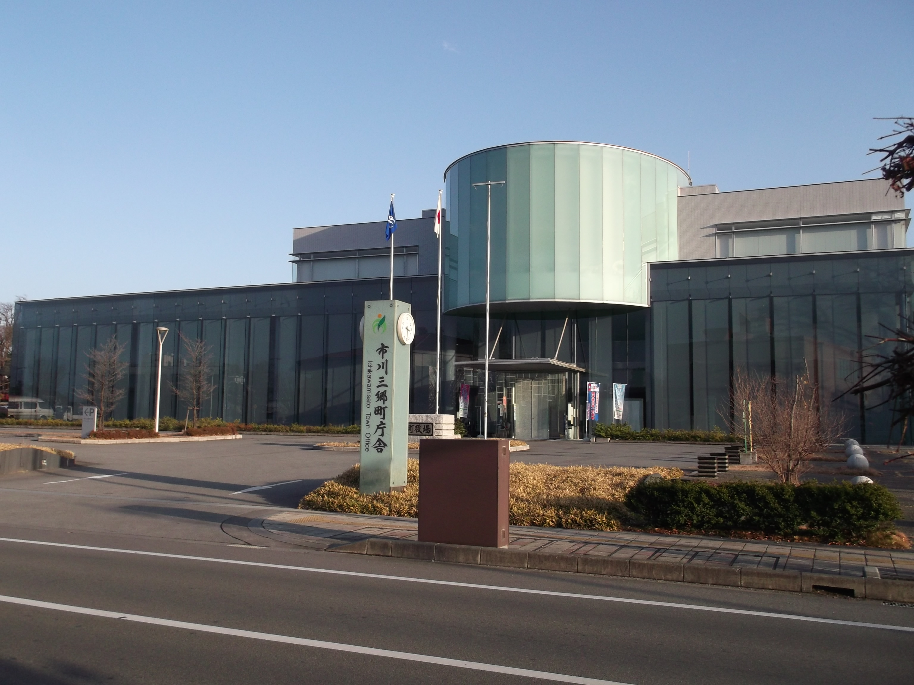 山梨県西八代郡市川三郷町役場